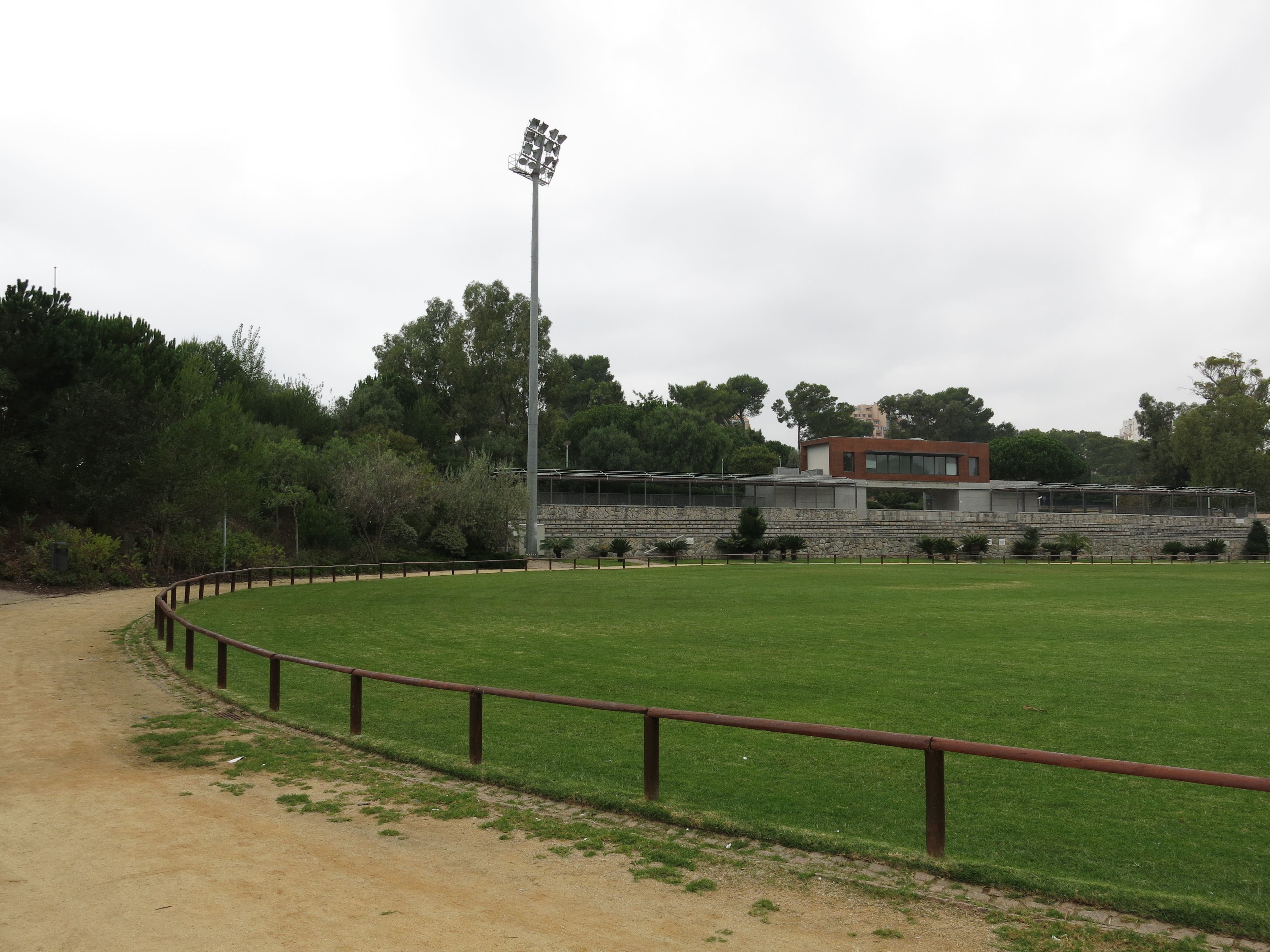 2016-10-21_Cascais_6180